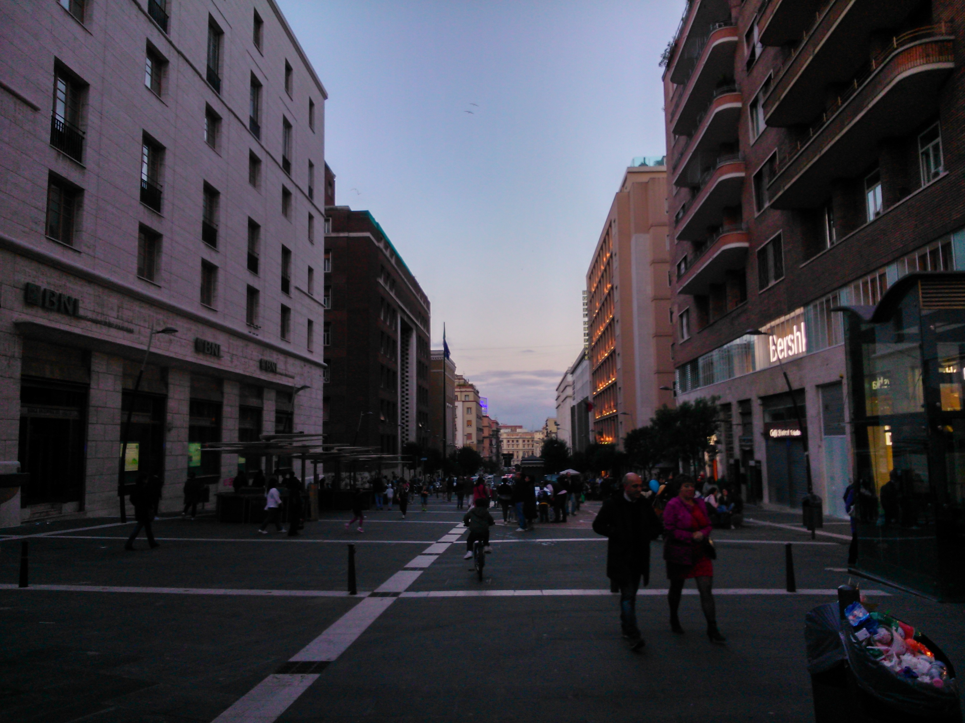 Via Armando Diaz ripresa dalla stazione Toledo della metropolitana.